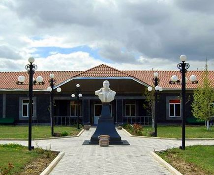 Վազգեն Սարգսյանի տուն-թանգարան